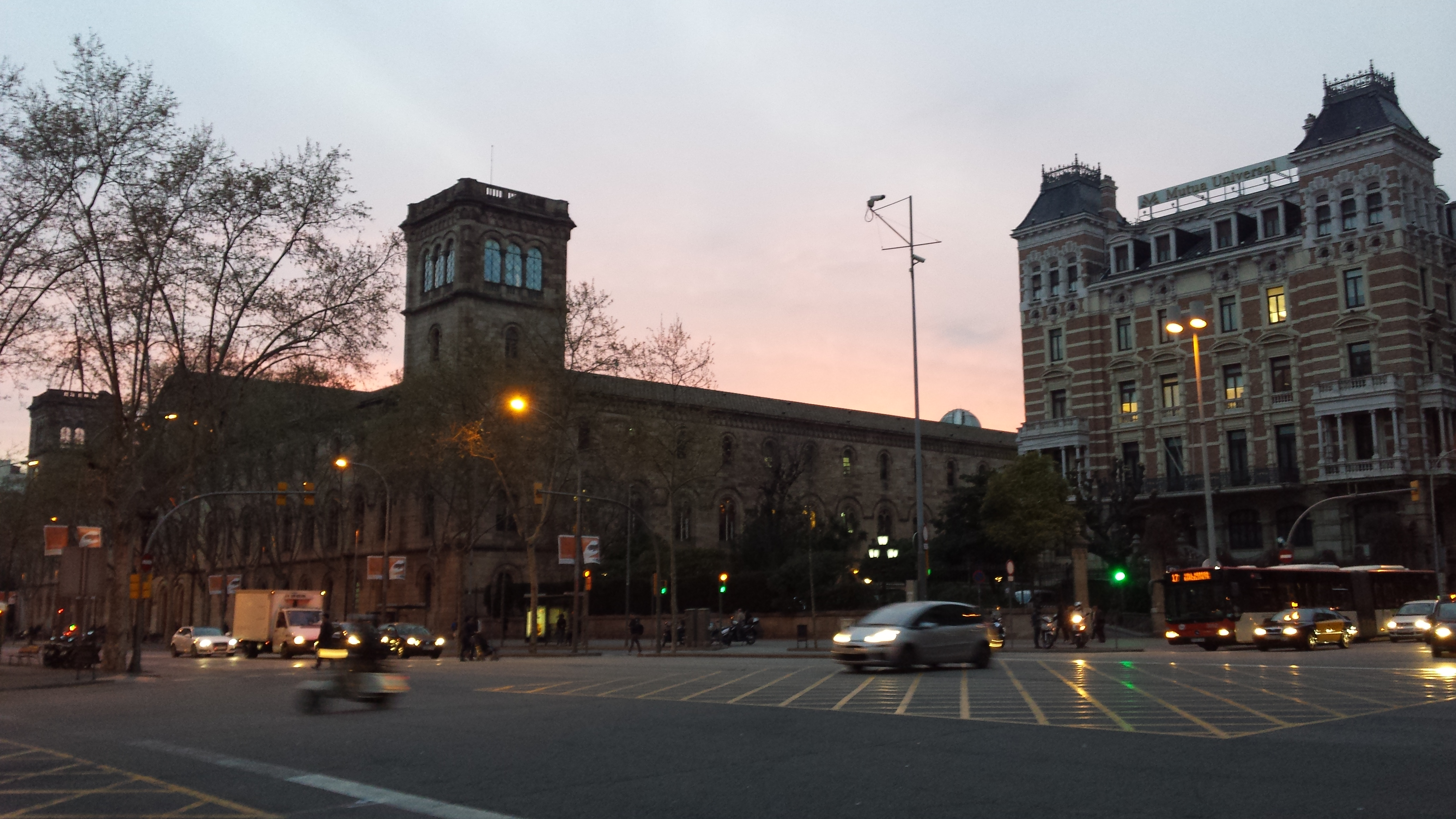 Edifici històric de la Universitat de Barcelona i Companyia de Gas Lebon al capvespre